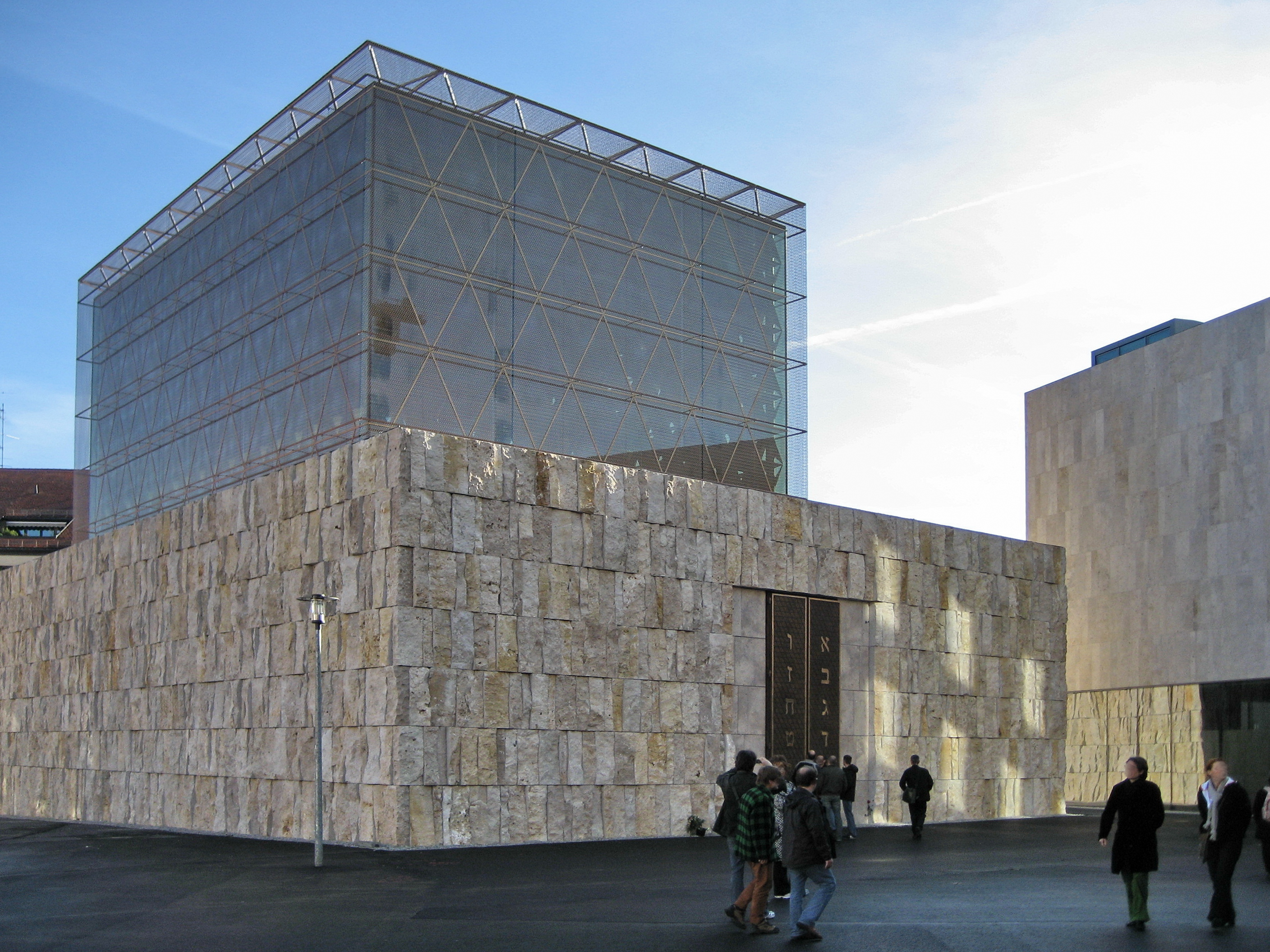 Title New Munich Synagogue at Sankt-Jakobs-Platz, Munich, Germany